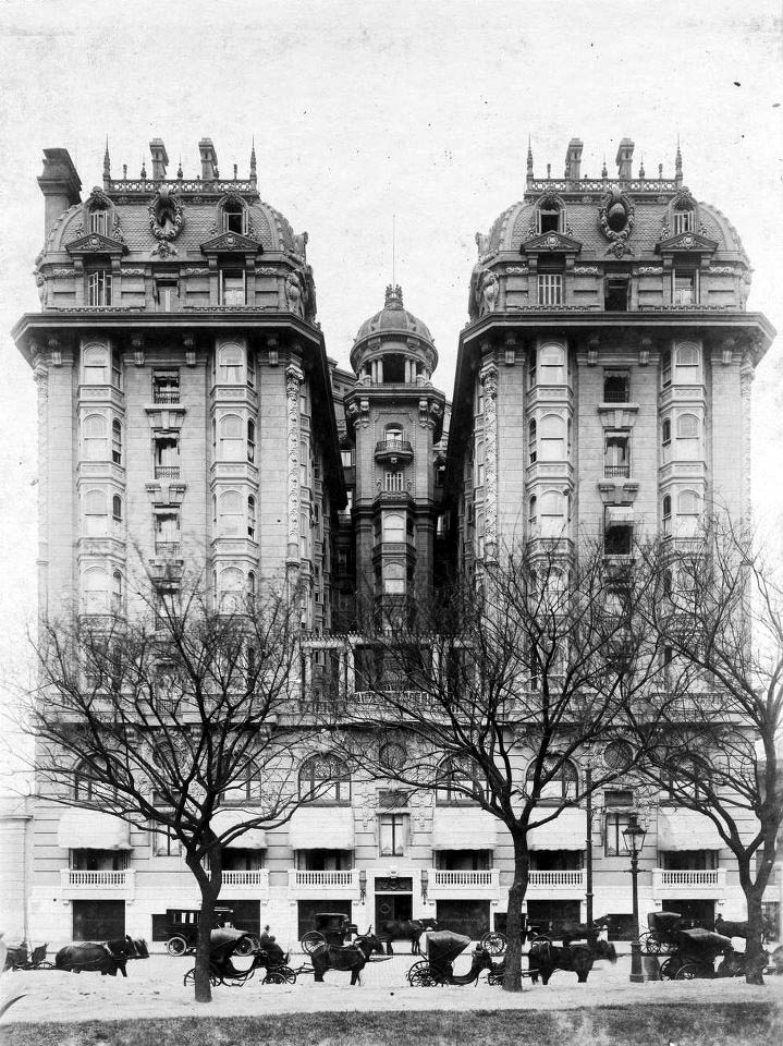 Fachadas del Plaza Hotel de Buenos Aires en años de su inauguración (1909).